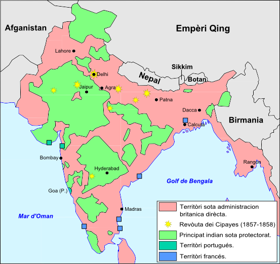 Division de la peninsula indiana en 1858 après la Revòuta dei Cipayes.